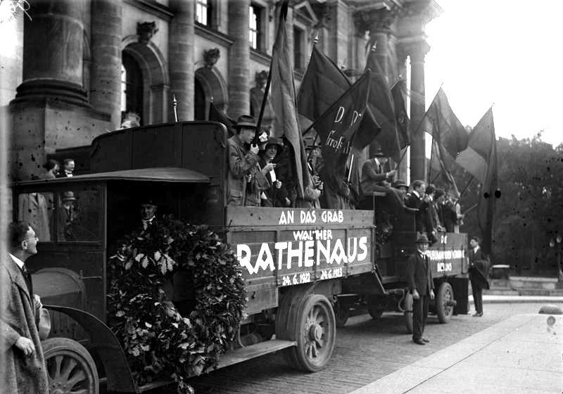 Rathenau-Gedächtnisfeier im Reichstag. Republikanische Jugend fährt an das Grab Rathenaus.